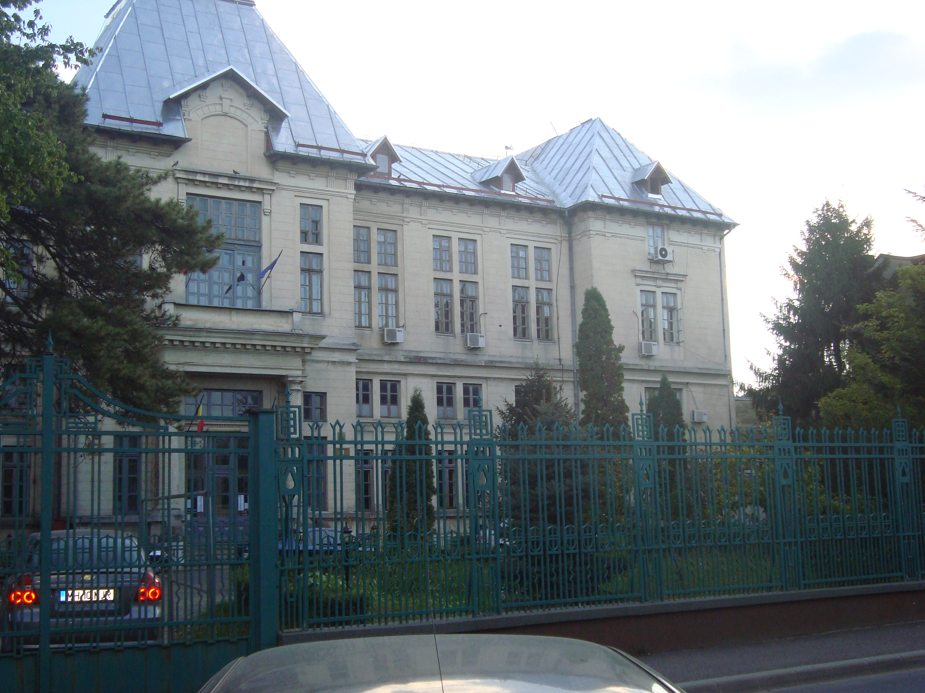 Tribunalul județean, Str. Carol I 14, Drobeta-Turnu Severin